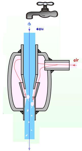 Pompa vacuo a getto d'acqua: funzionamento da